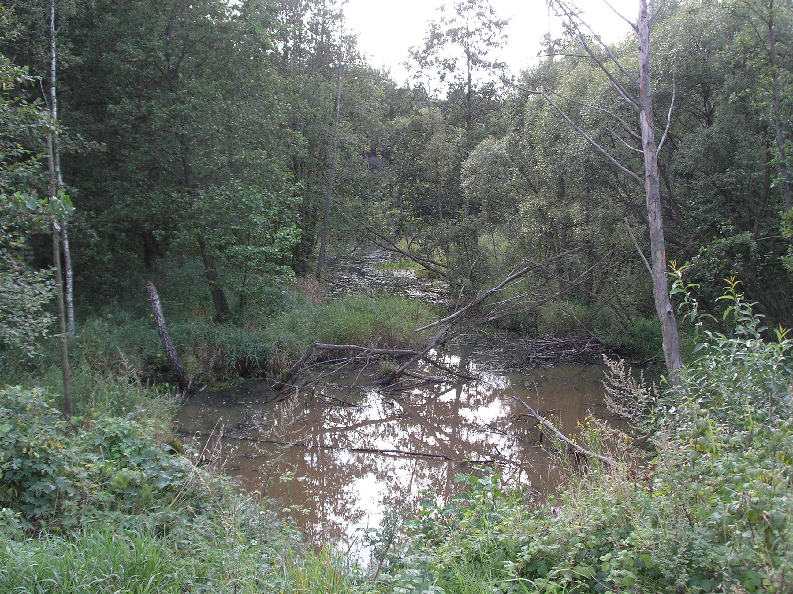 Maleniec. Fragment starorzecza rzeki Czarnej